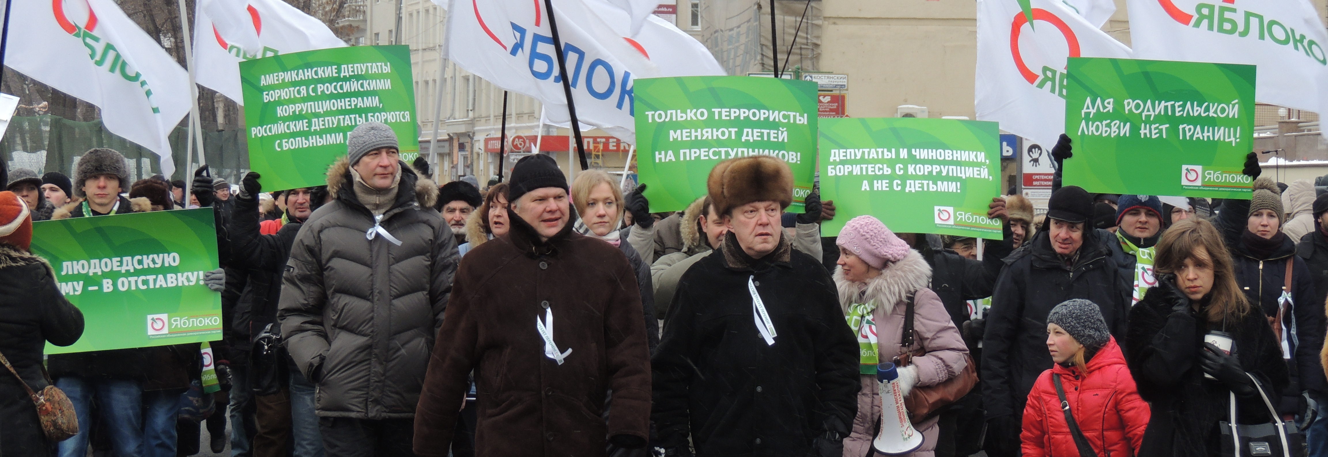 Марш оппозиции 13 января 2013 года в Москве, Тургеневская площадь, руководители партии "Яблоко" Митрохин и Явлинский во главе колонны